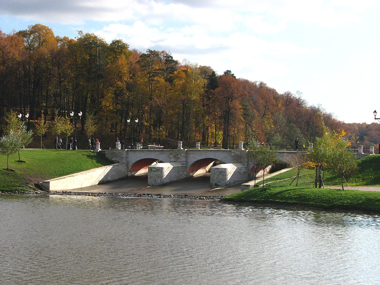 Плотина, разделяющая Верхний и Средний Царицынские пруды